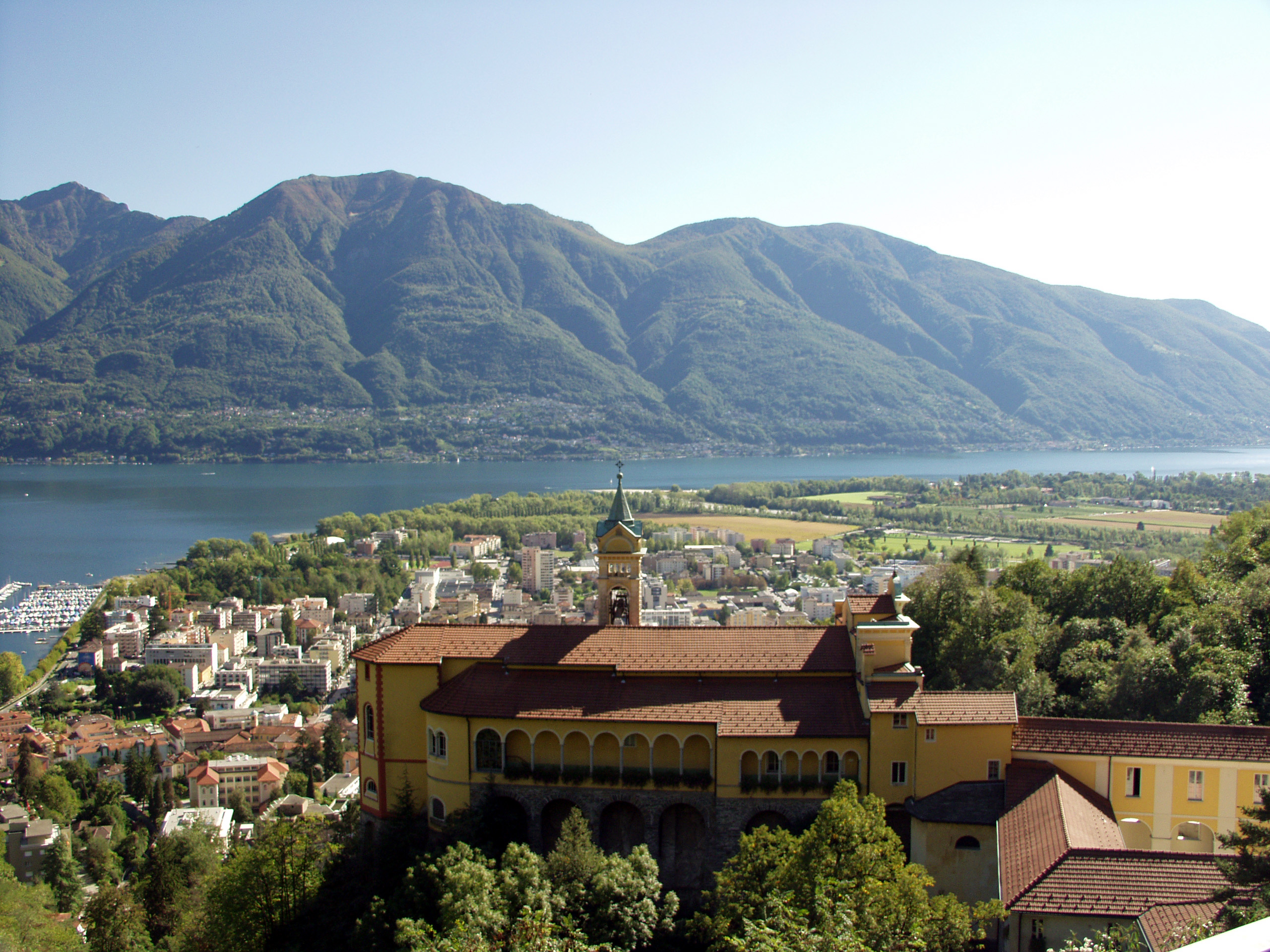 Wallfahrtskirche Madonna del Sasso (Orselina/Schweiz)